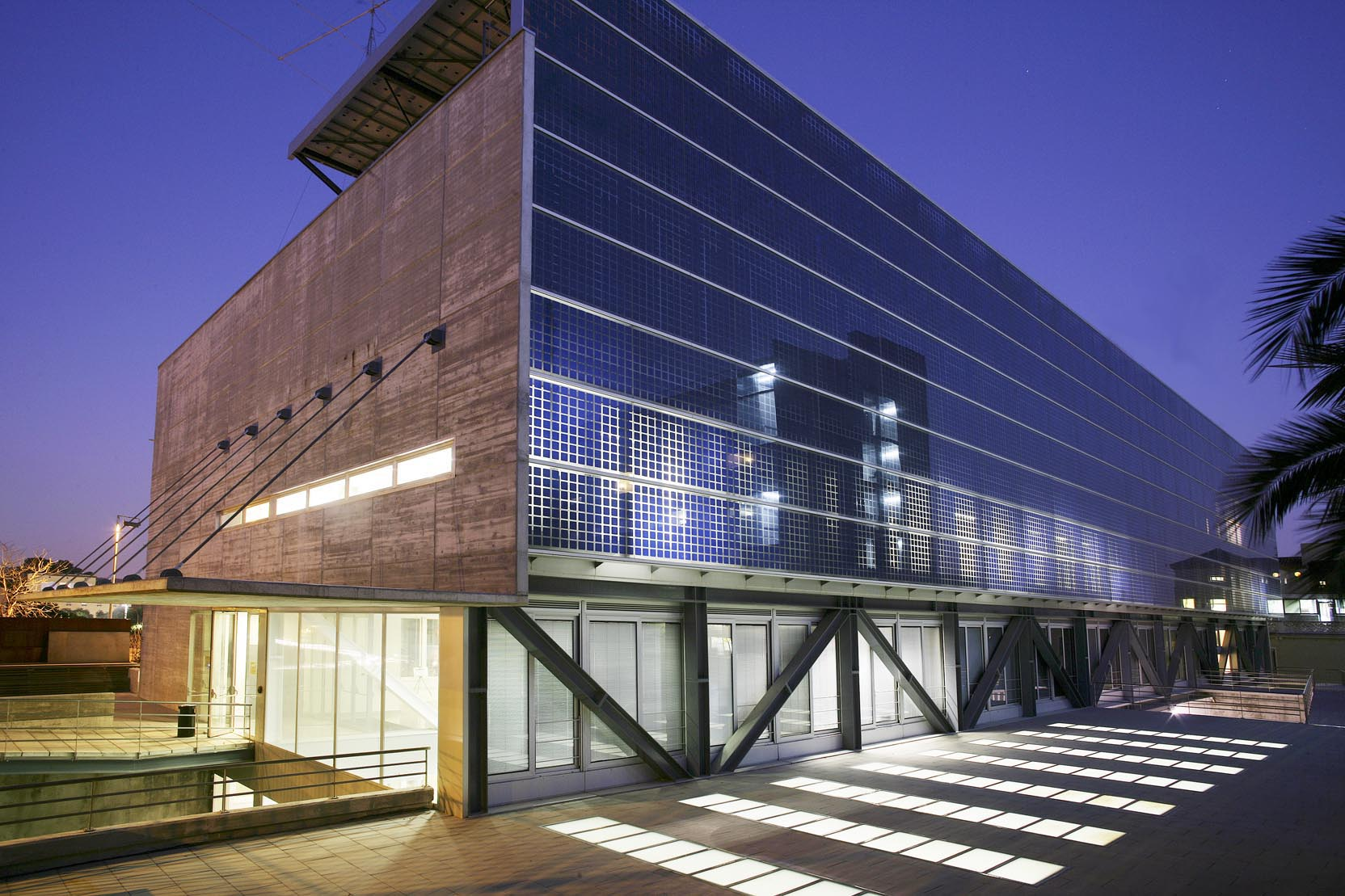 Edifici Sant Jaume